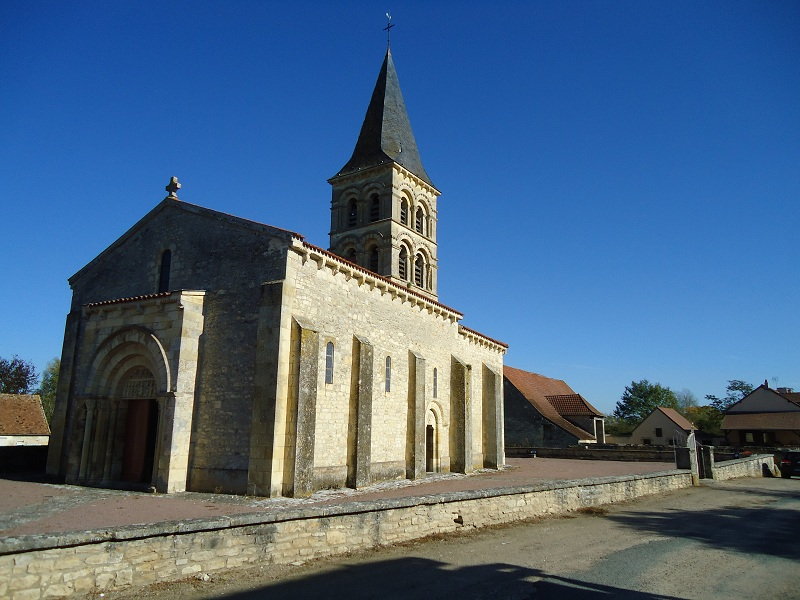 L'église de Mars-sur-Allier